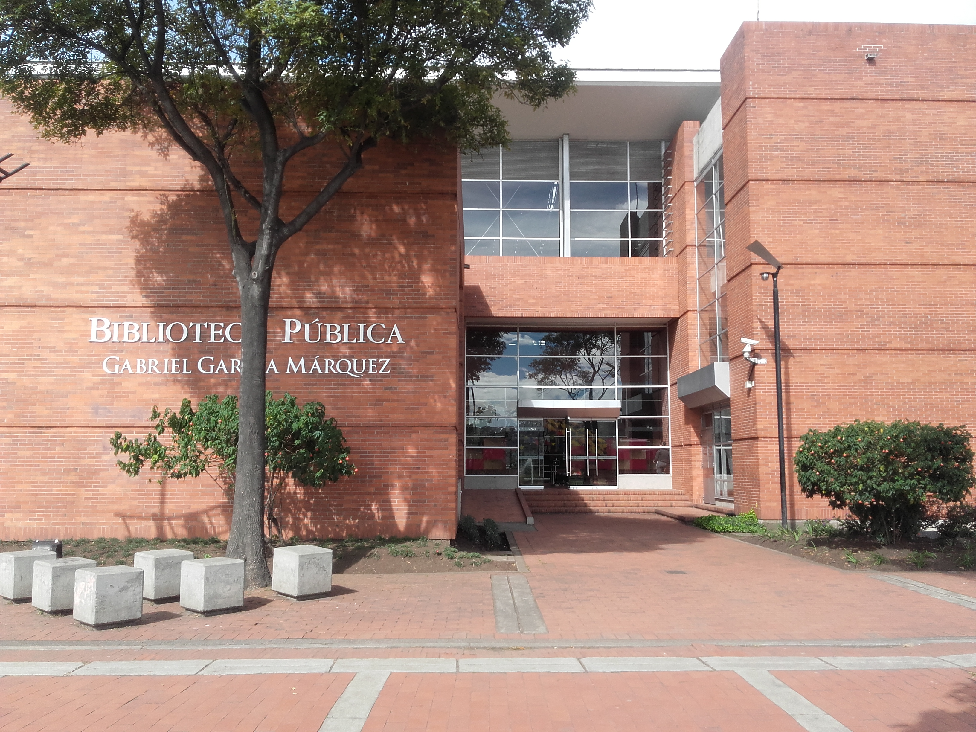 boblioetehd